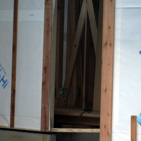 欠陥住宅_木造_下地_01